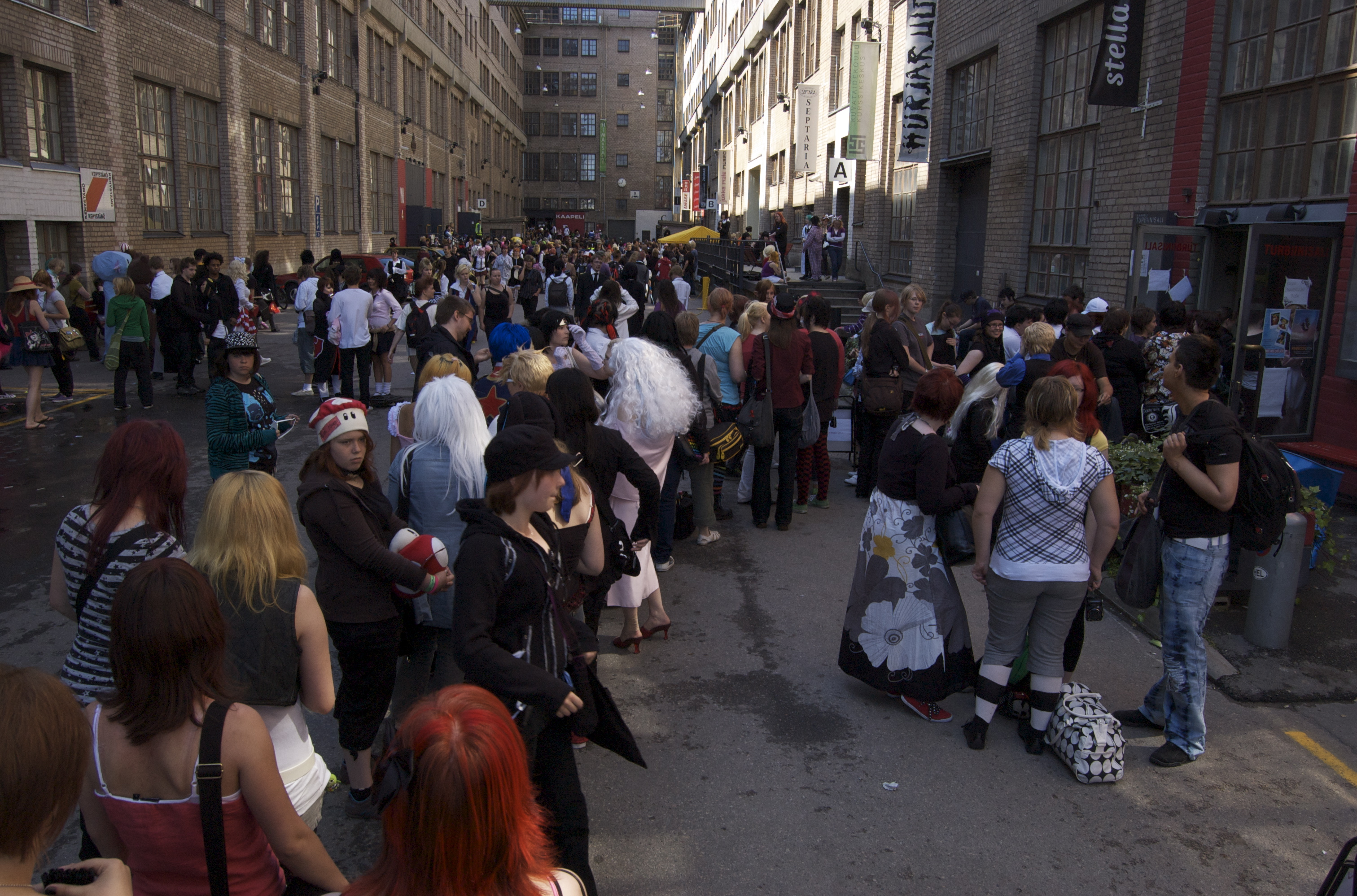 Finncon-Animecon 2009